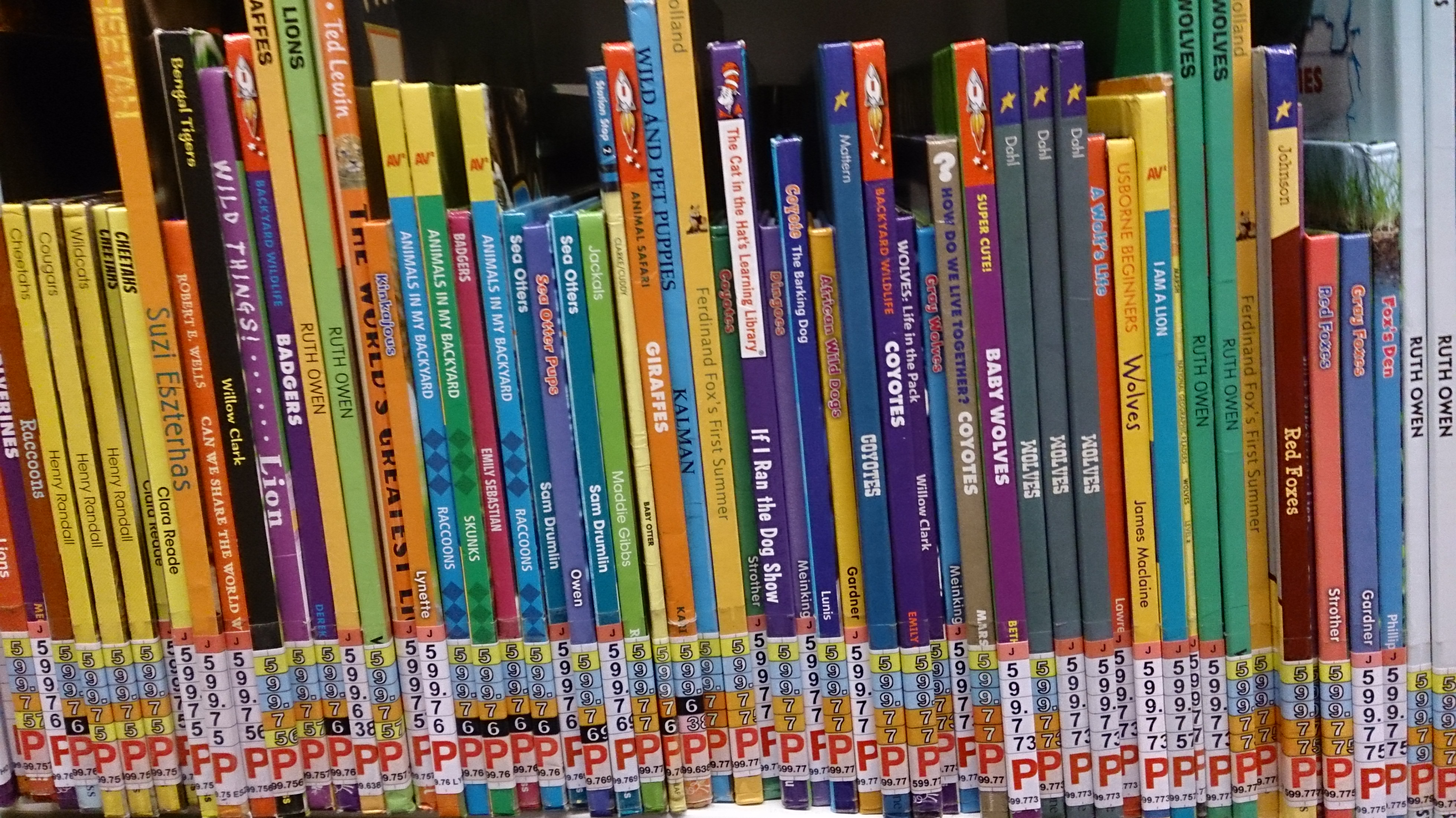 children books